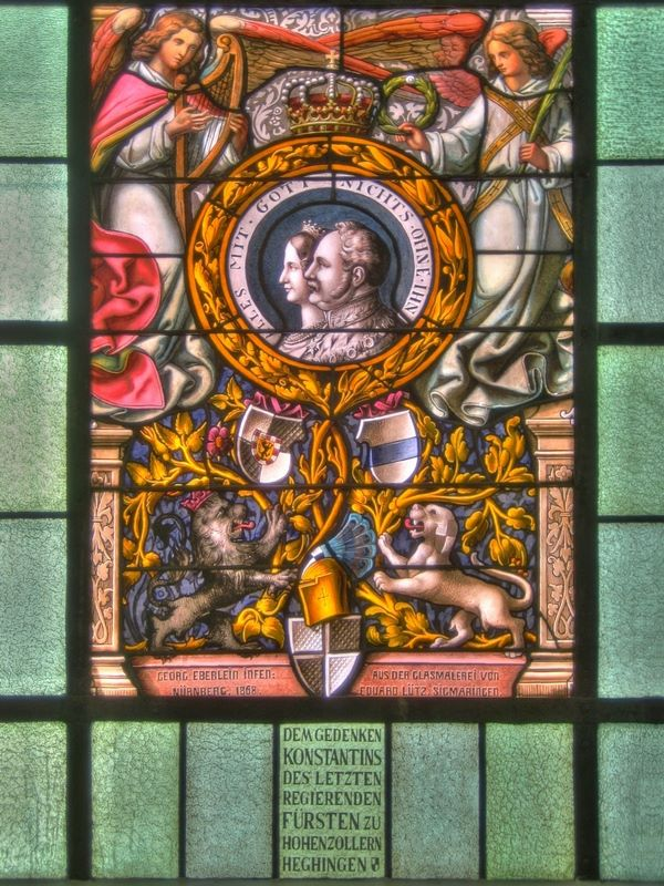 Fenster zum Gedenken an Fürst Konstantin (mit Fürstin Eugenie) in der Stiftskirche Hechingen